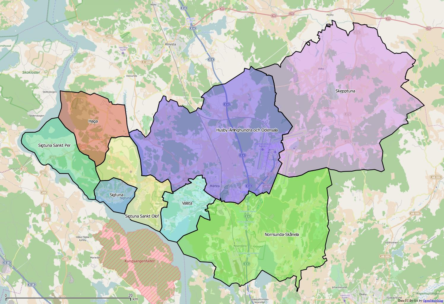 Distriktsindelningen i Sigtuna kommun World file: 47.51501355940914806 0 0 -47.51501355940914806 1952907.84912374289706349 8346458.63839425146579742